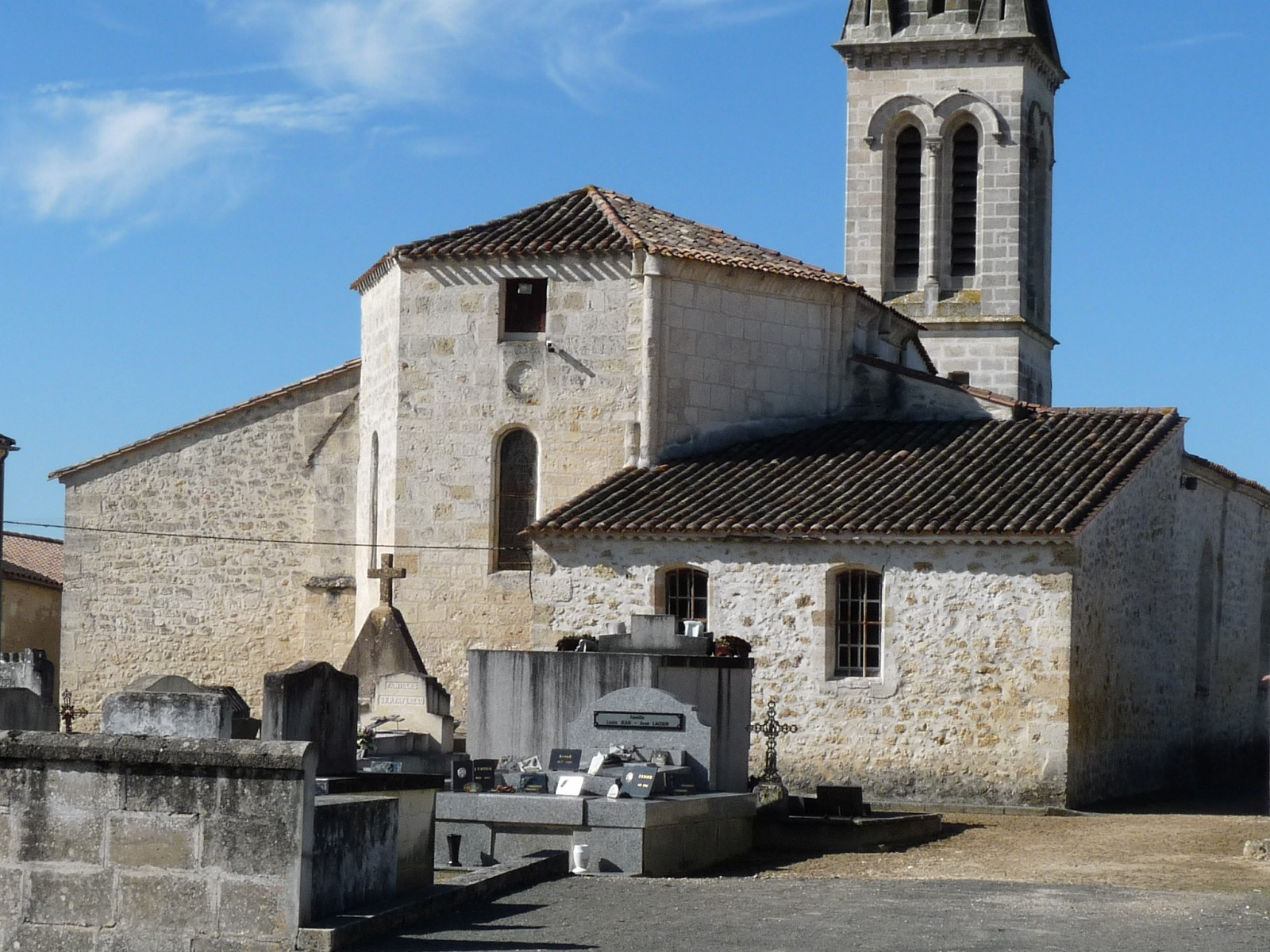 Eglise de Saint-Mariens, Gironde, France